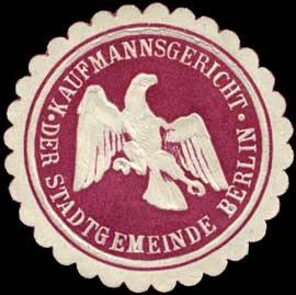 Sealing stamp Title: Kaufmannsgericht der Stadtgemeinde Berlin Description: rotbraun, weiß, geprägt Place: Berlin size: 4 cm